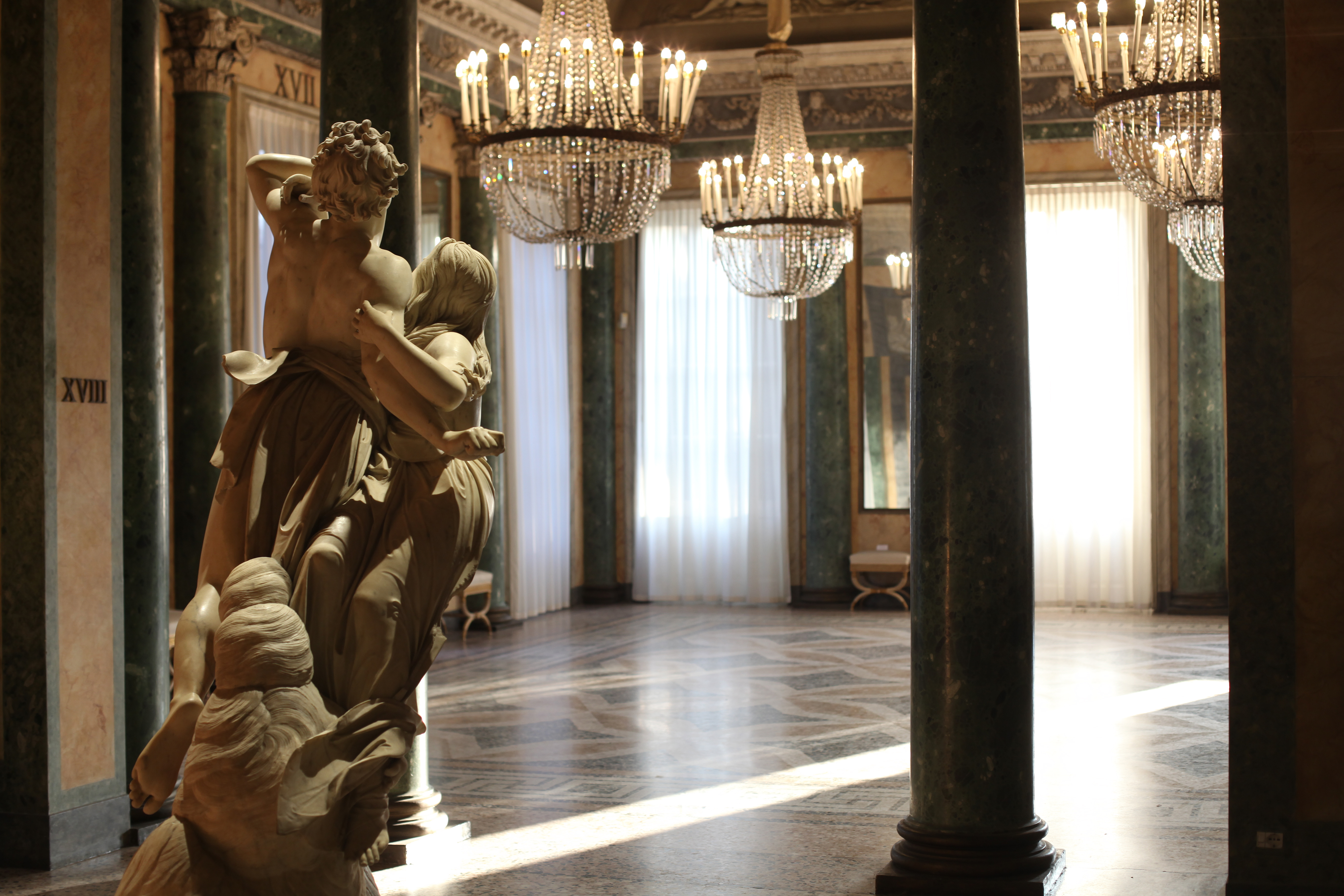 Galleria d'Arte Moderna di Milano, allestimento della Sala XVII nel 2018; in primo piano il gruppo scultoreo Paolo e Francesca di Alessandro Puttinati (1863)